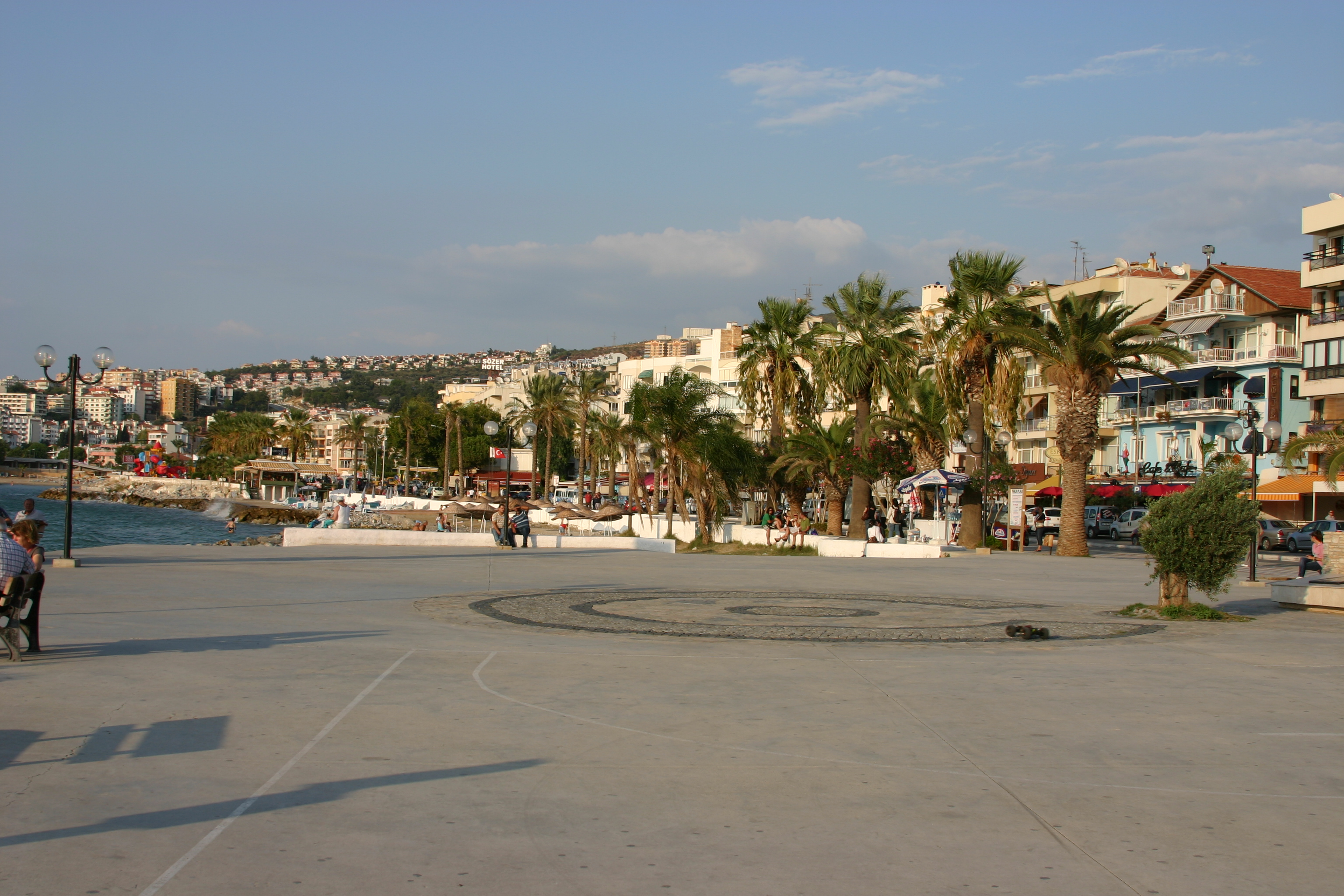 Praia em Kuşadası, na Turquia